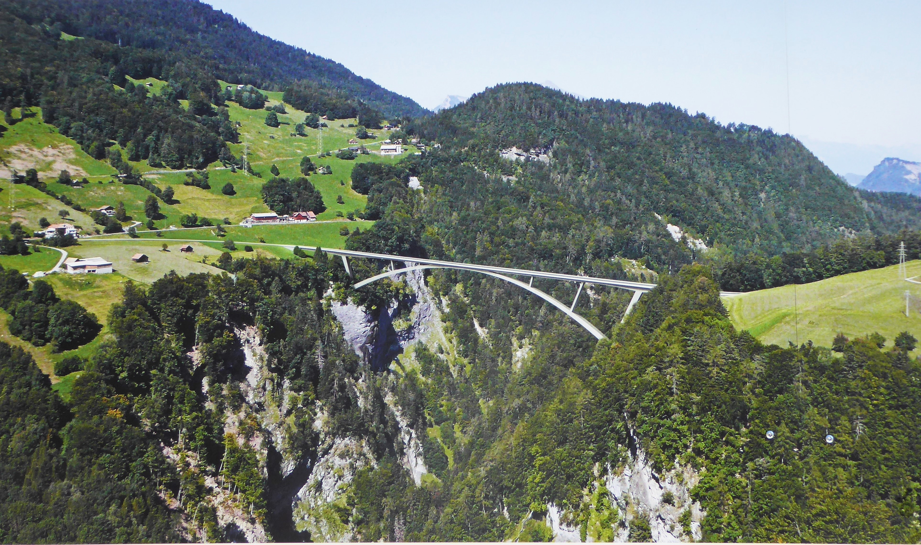 Fotomontage der Taminabrücke auf der Informationstafel an der Baustelle im Jahr 2016